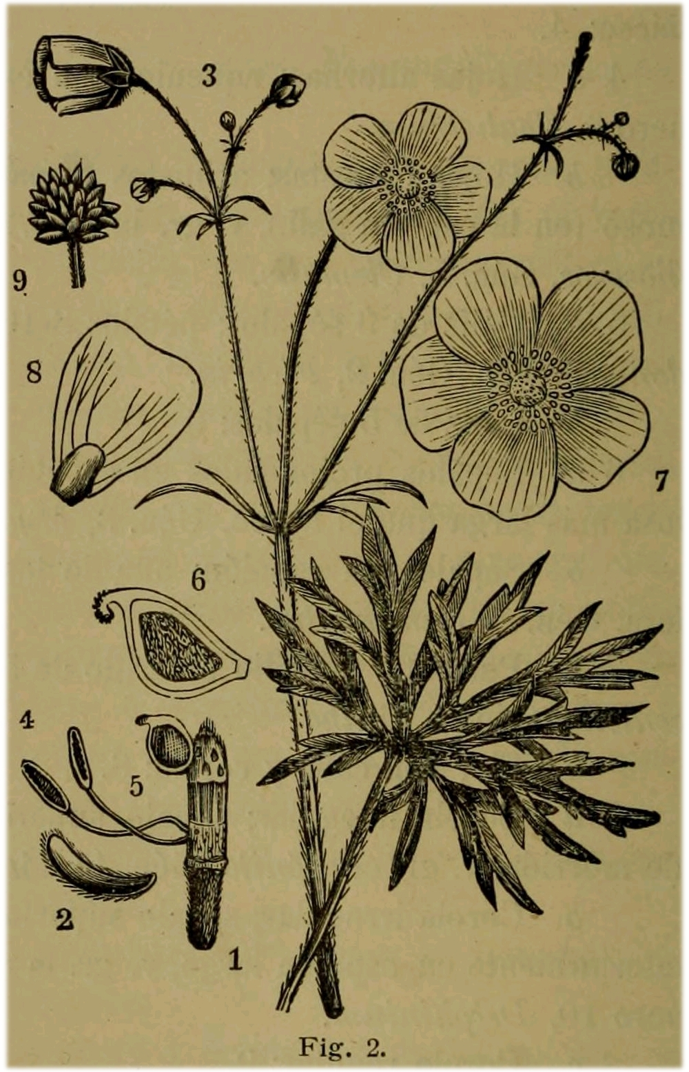 Ilustración de Ranunculus Steveni, Ranunculus acris incluída no libro Flora descriptiva é ilustrada de Galicia do botánico R. P. Baltasar Merino S. J.